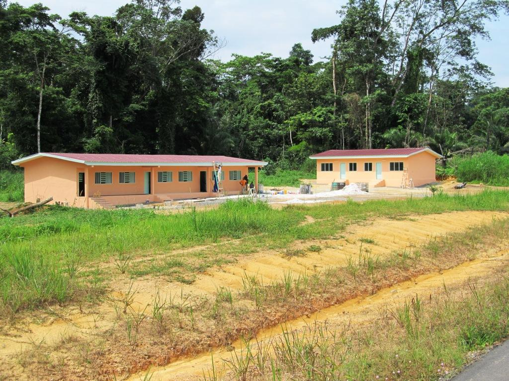 Ecole réalisée par la société E.G.F. au Gabon